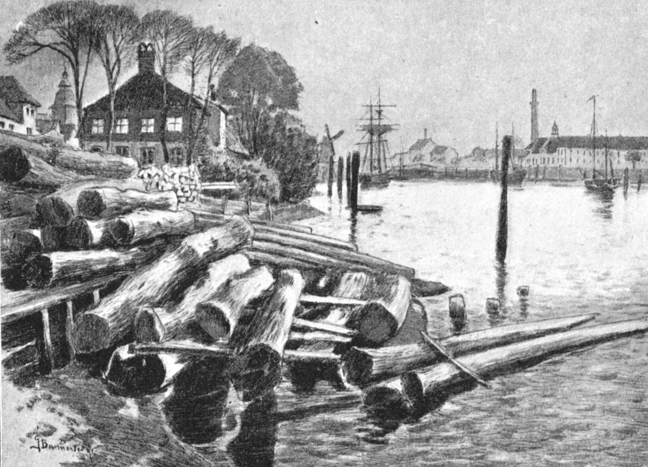 Blick auf Glückstadt, Zeichnung von Georg Burmester um 1895